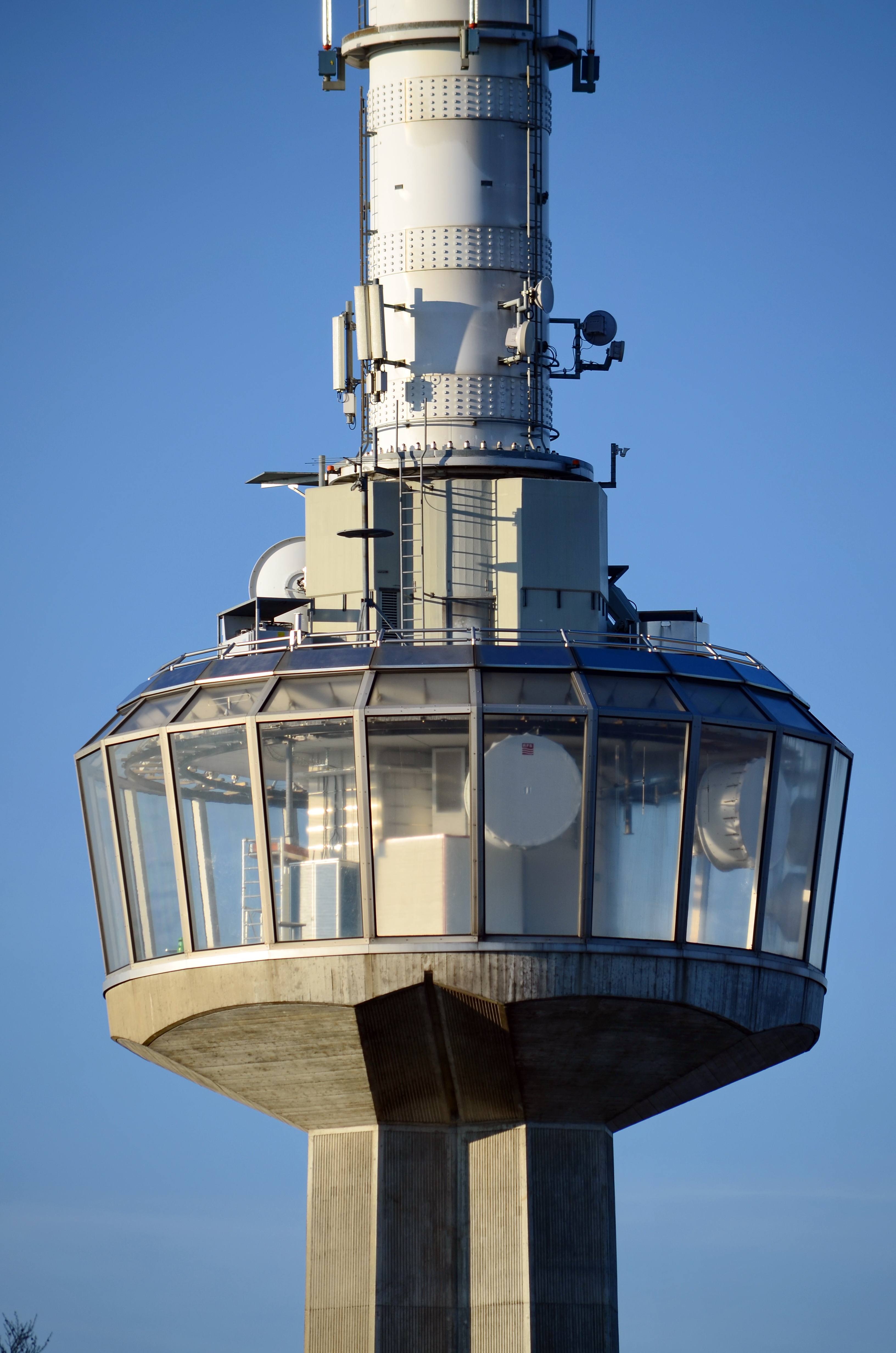 Swisscom Fernsehturm, Uetliberg (Switzerland)